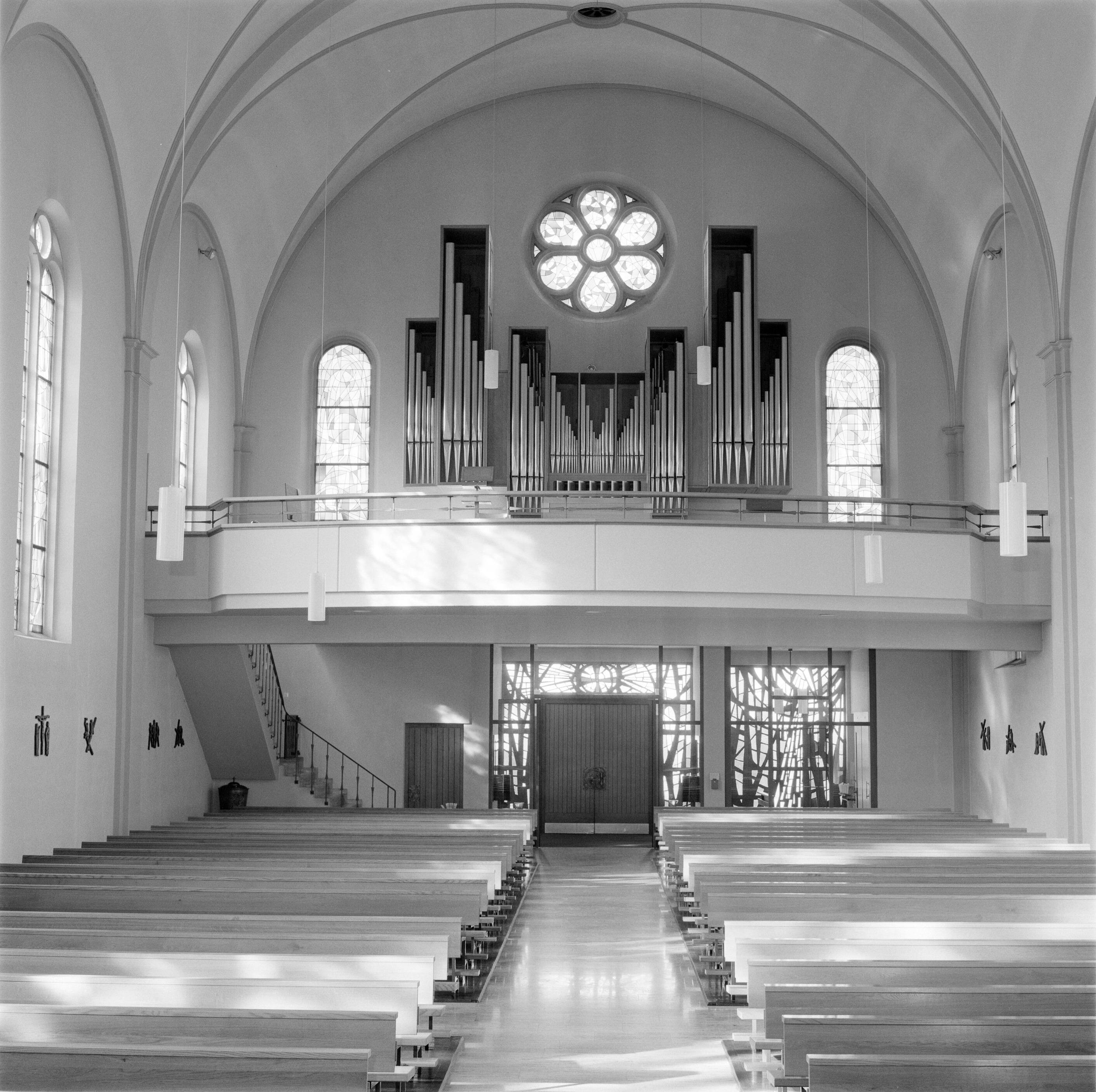 Orgelaufnahmen, Sulz, St. Georg